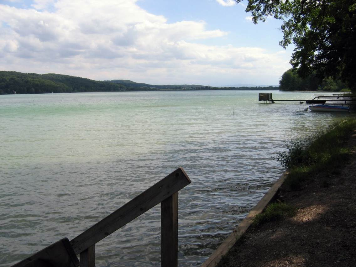 Der Pilsensee; Blick vom Standbad Hechendorf nach Süden. Von mir (Michael P. Geyer) aufgenommen.